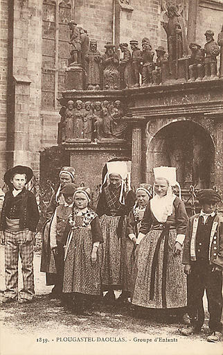 Groupe d'enfants à Plougastel en 1859 (photo anonyme, carte postale, musée des arts et traditions populaires)